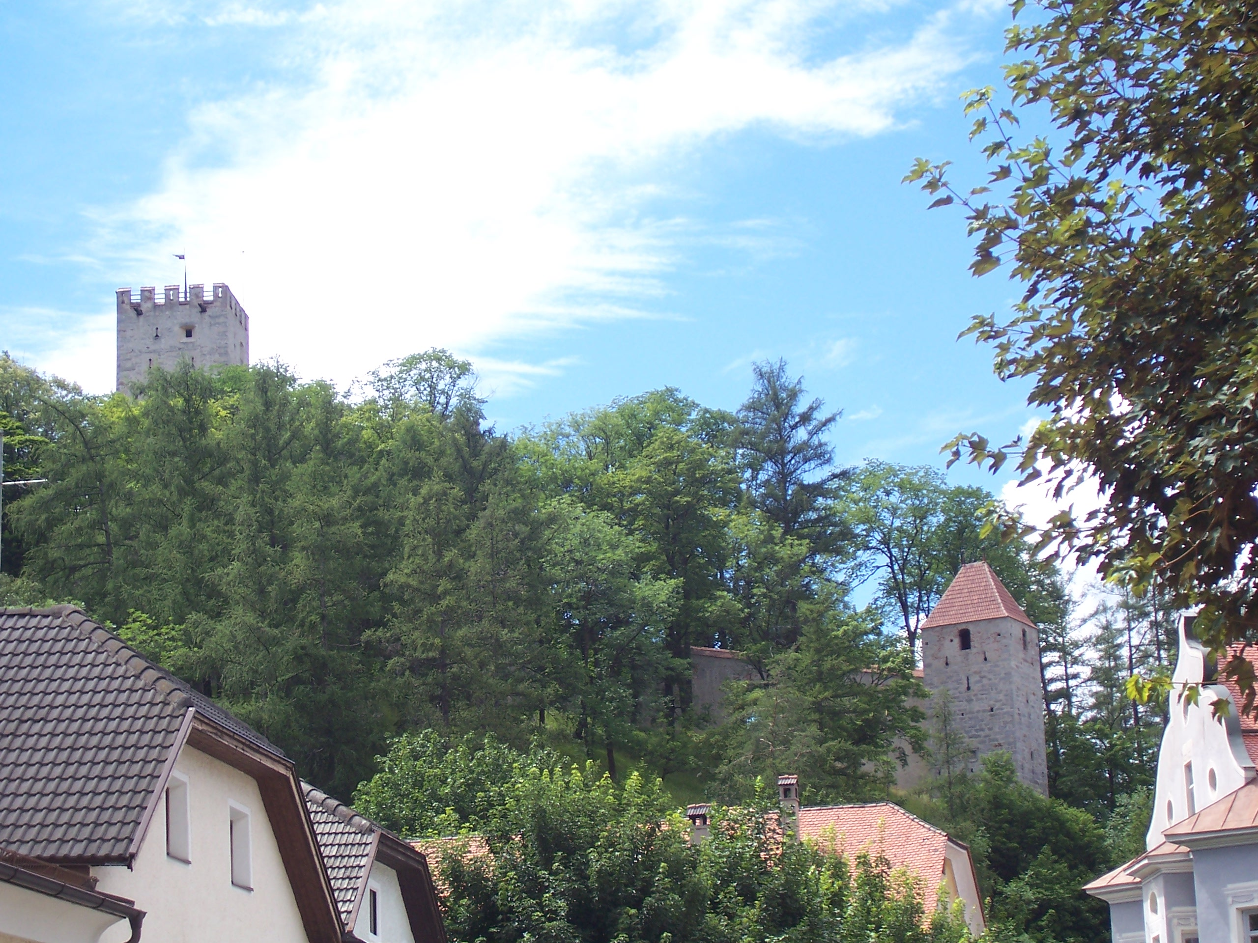 Burg Bruneck (Bruneck, Südtirol) - Castello di Brunico (Brunico, Alto Adige) - Brunico Castle (Brunico, South Tyrol)